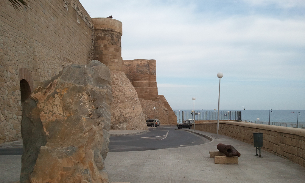 Antigia ciudad Rusadir